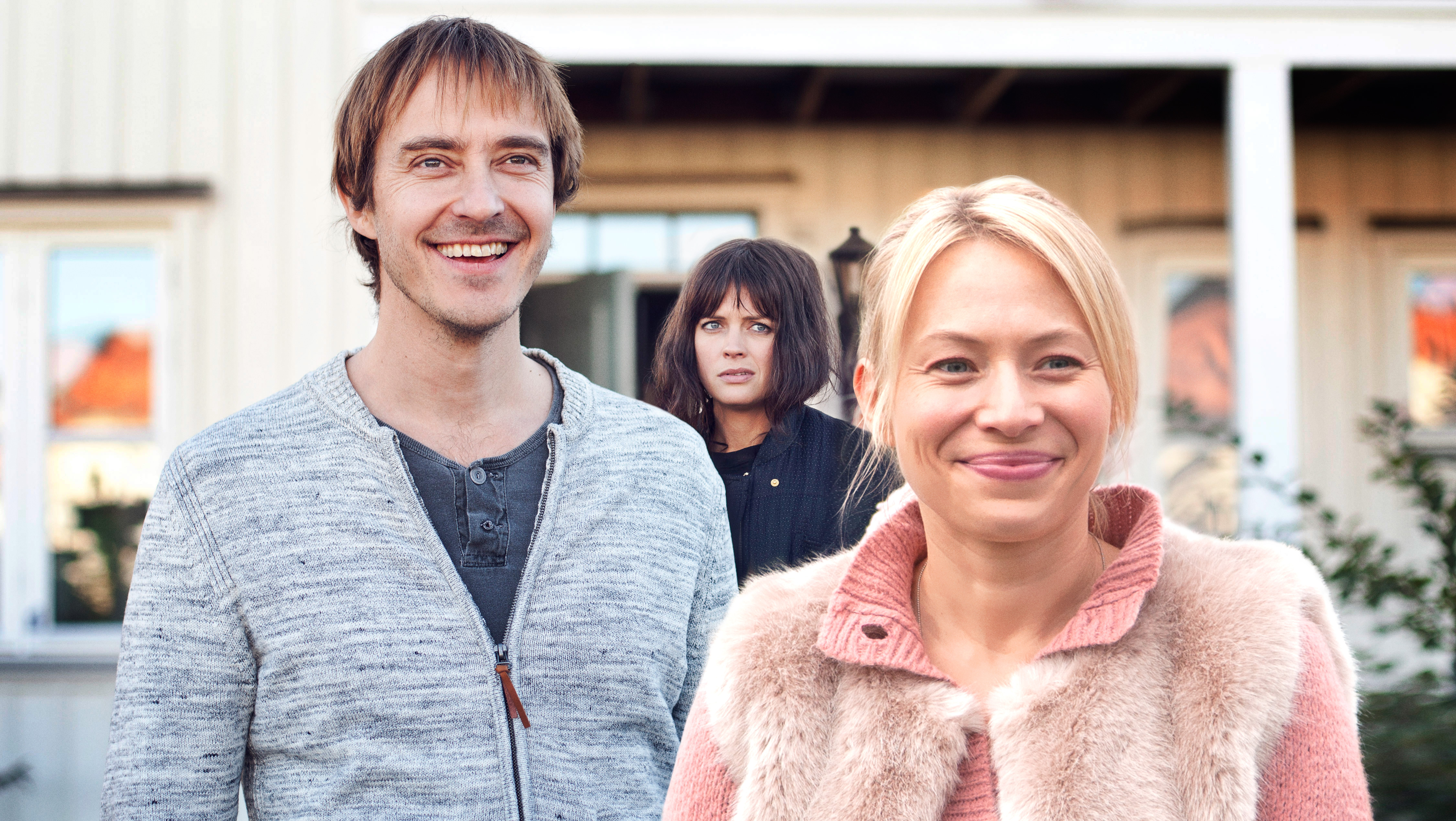 Jonas Karlsson, Frida Hallgren och Josephine Bornebusch (i bakgrunden) i komedin Hallonbåtsflyktingen.